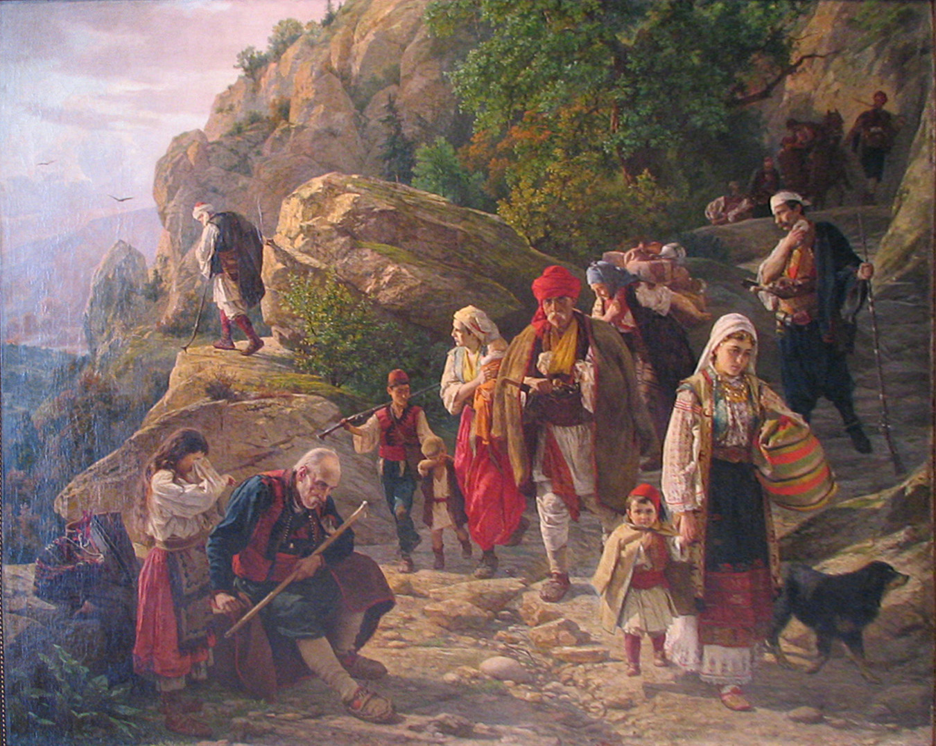 Херцеговачки бегунци, рад Уроша Предића из 1889. године